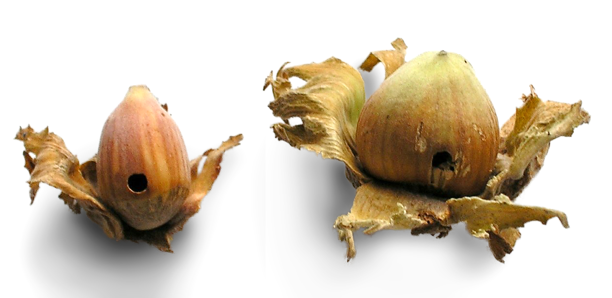 Noisettes montrant les trous de sortie des larves de balanin